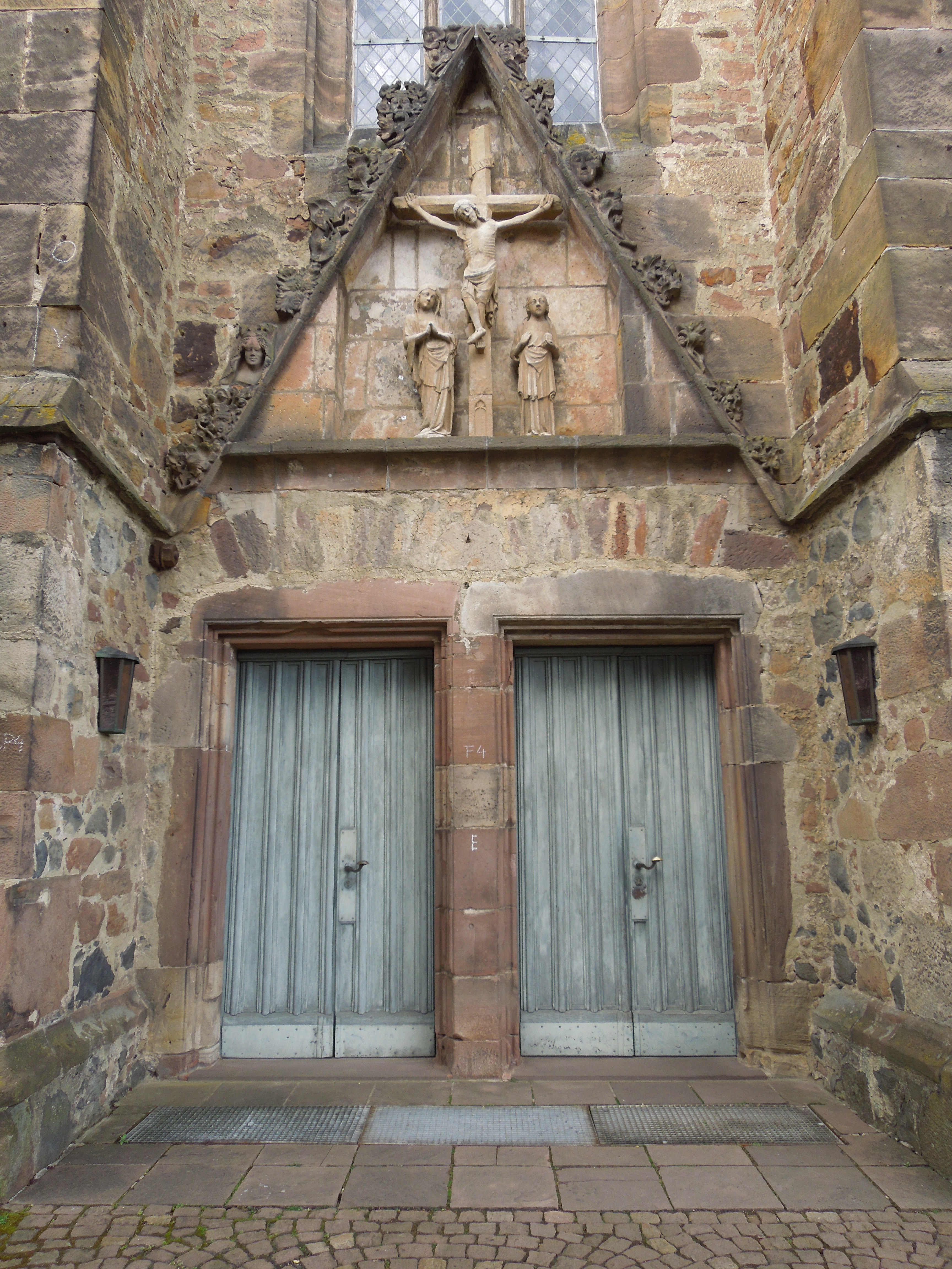 Fritzlar, Hauptportal der ev. Stadtkirche, der ehemaligen Minoritenklosterkirche